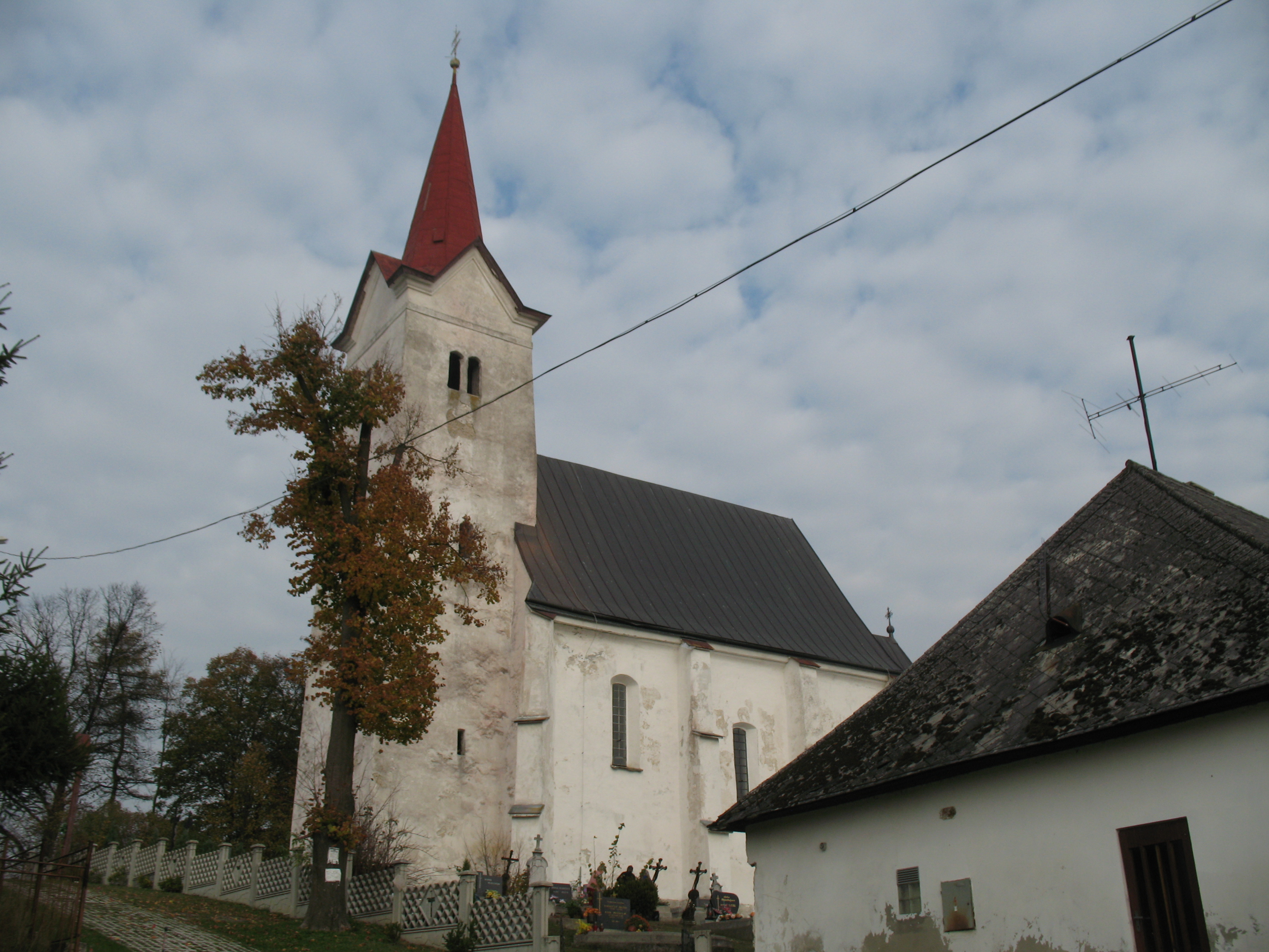 Turócszentgyörgy